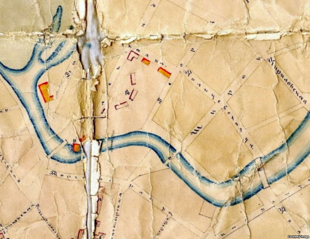 Беларуская (тарашкевіца): Менск (Miensk), Траецкая гара (Trajeckaja hara). Плян